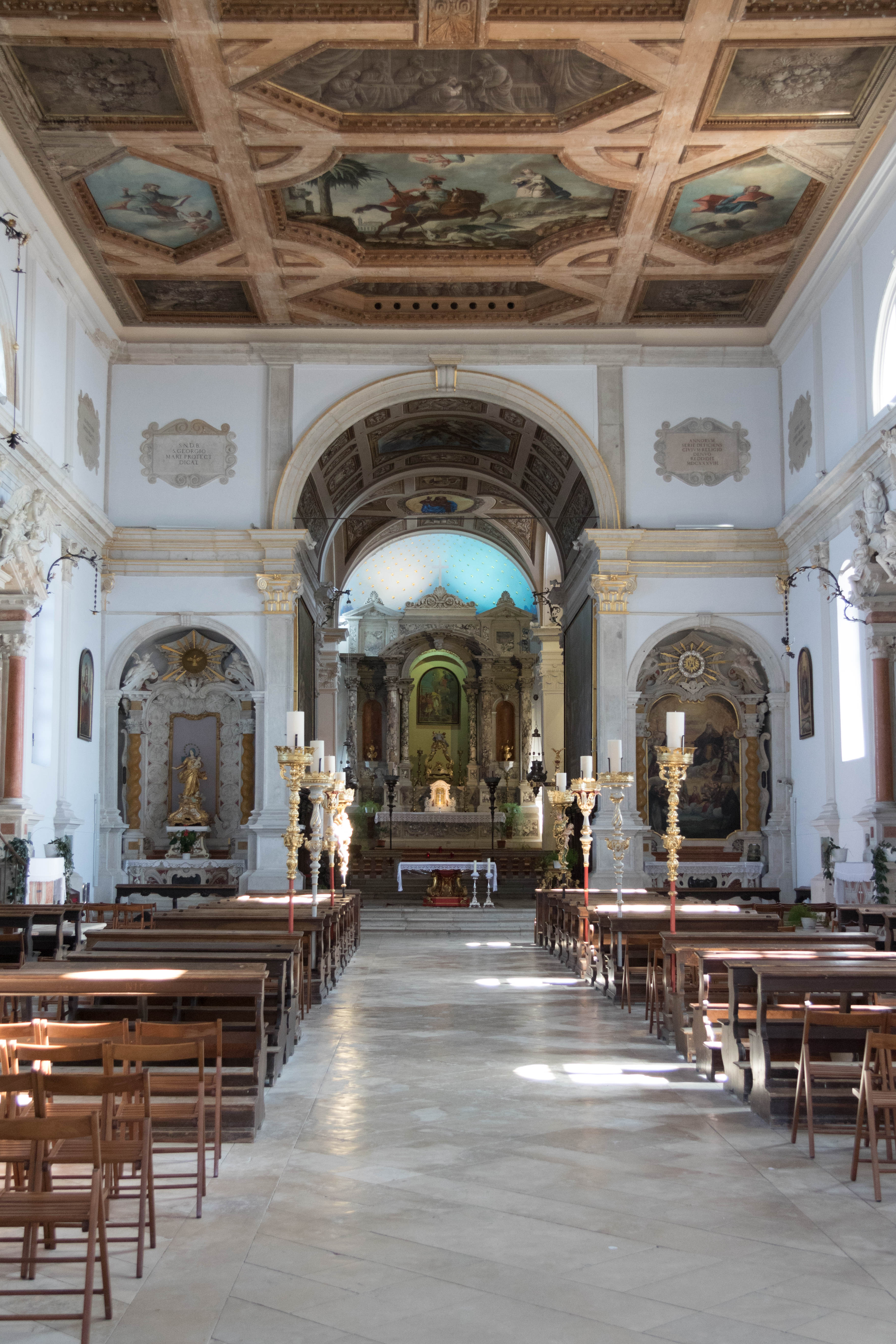 Piran